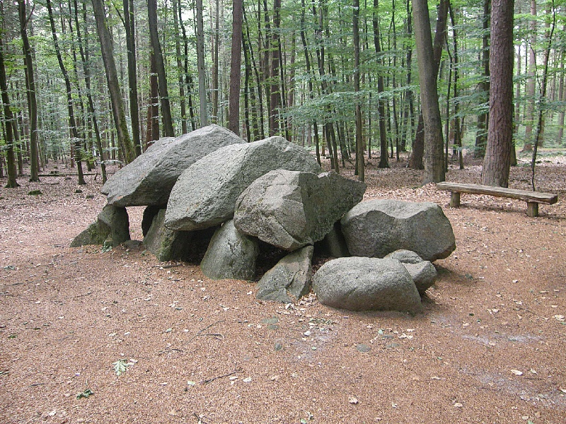 Bilder aus Lamstedt